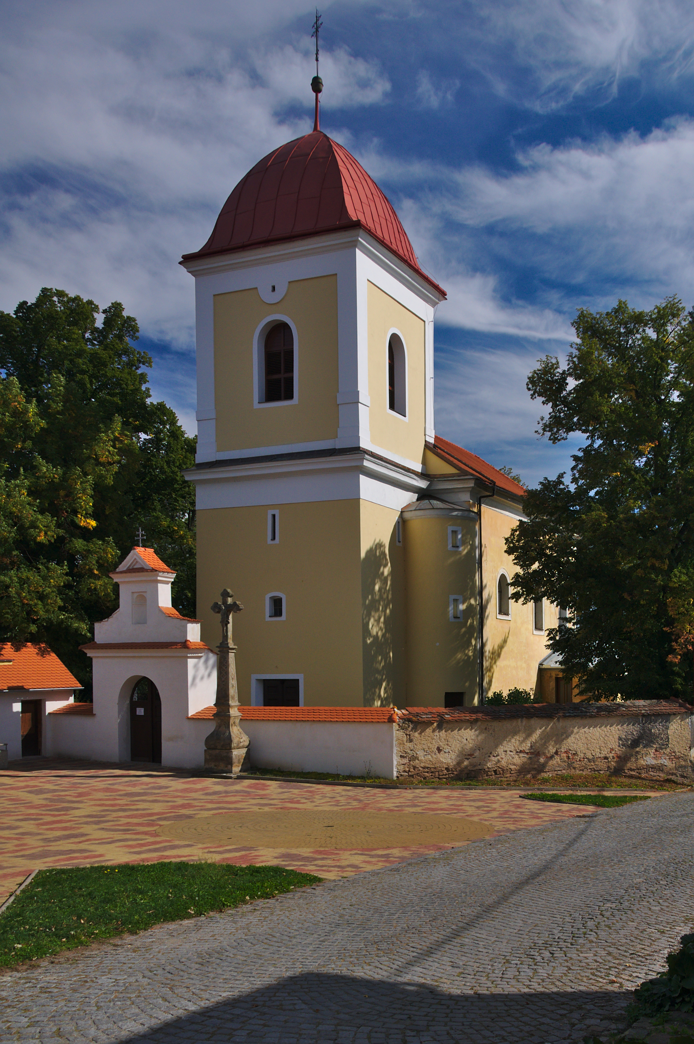 Kostel svatého Jana Křtitele, Svitávka, okres Blansko